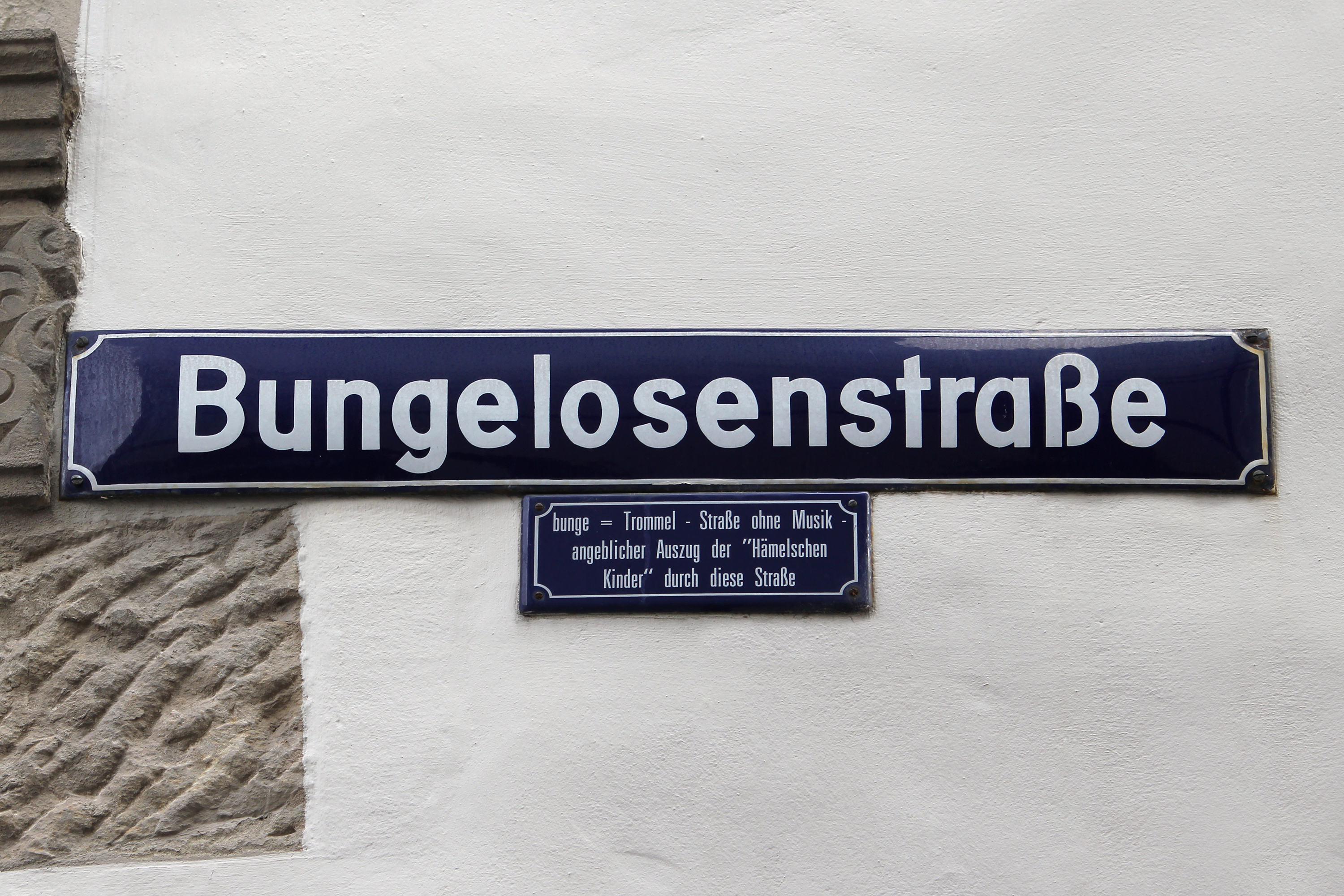 Straßenschild der Bungelosenstraße in Hameln, mit Zusatzschild "bunge = Trommel - Straße ohne Musik - angeblicher Auszug der 'Hämelschen Kinder' durch diese Straße